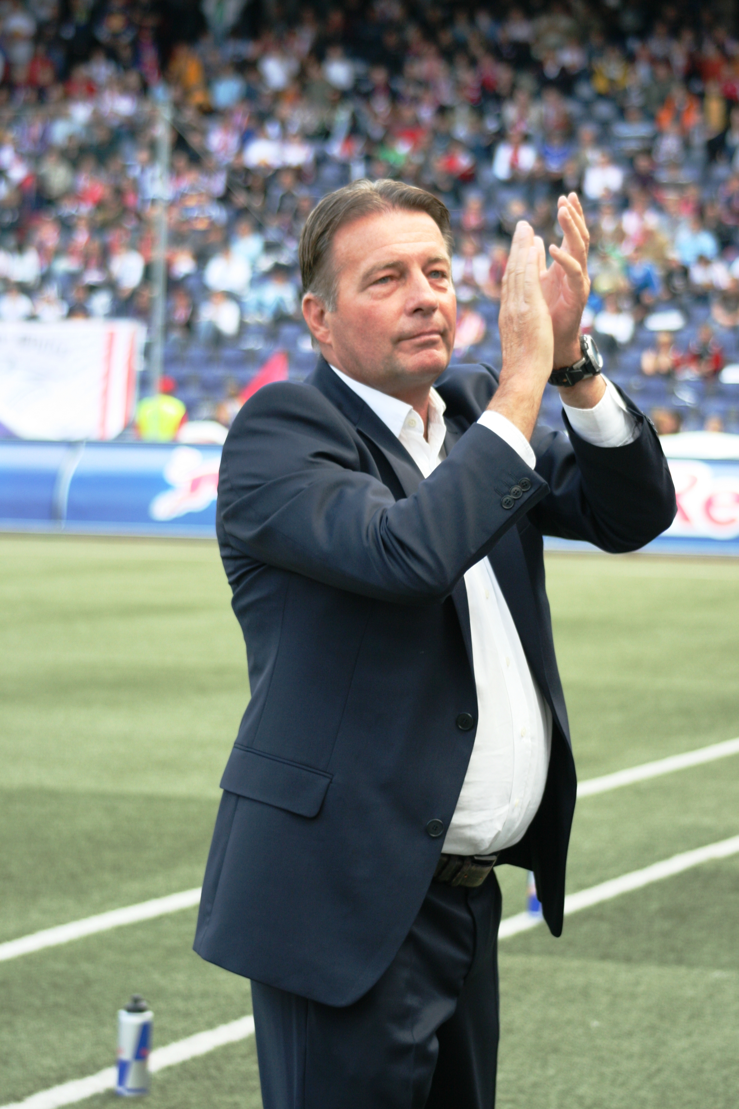 Co Adriaanse bedankt sich beim Publikum bei seinem letzten Spiel als Trainer des FC Red Bull Salzburg (Saison 2008/09)